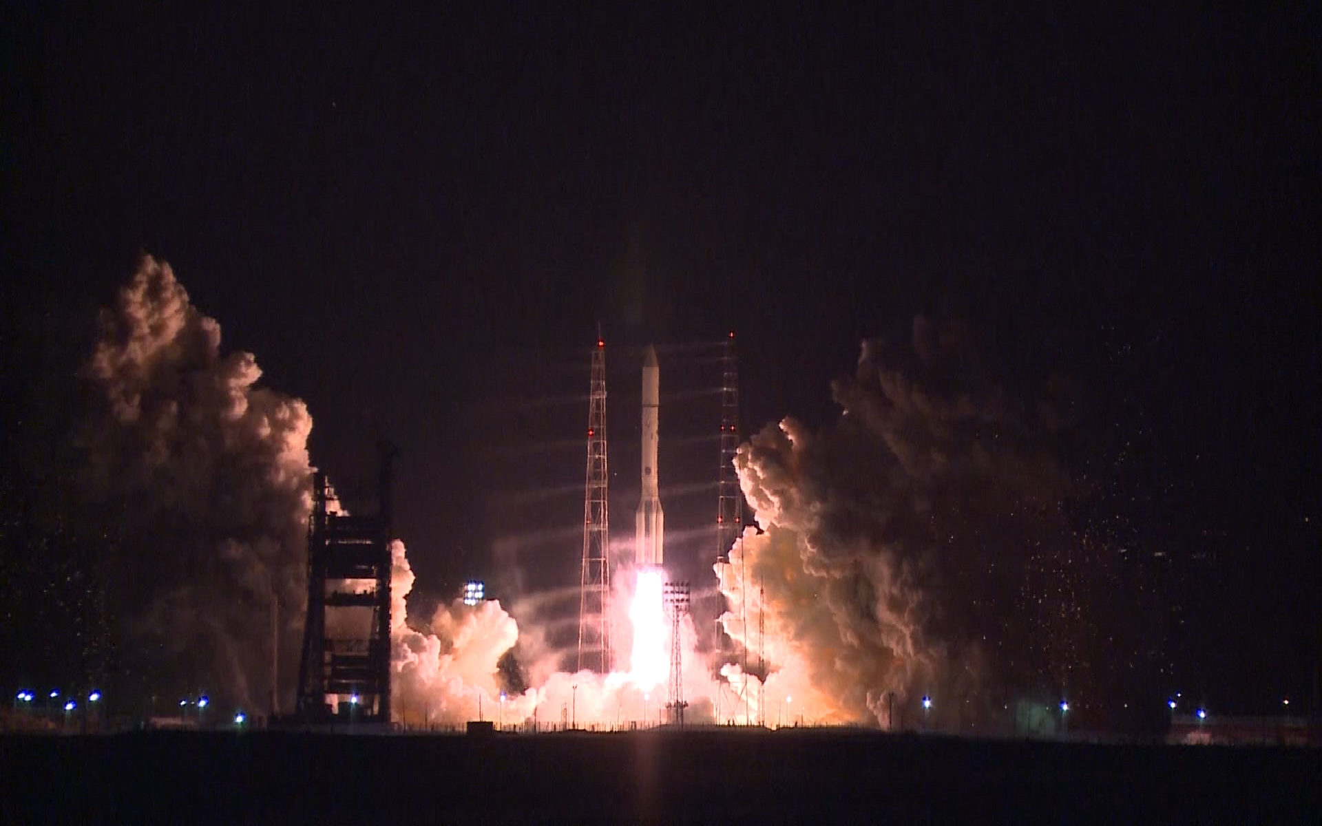 Старт ракеты «Протон-М» со спутником «Благовест» № 13Л 21 декабря 2018 года (скриншот видеозаписи на сайте Министерства обороны Российской Федерации)